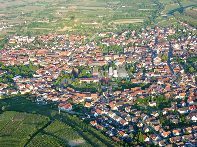 Luftbild von Ihringen aufgenommen bei einer Ballonfahrt